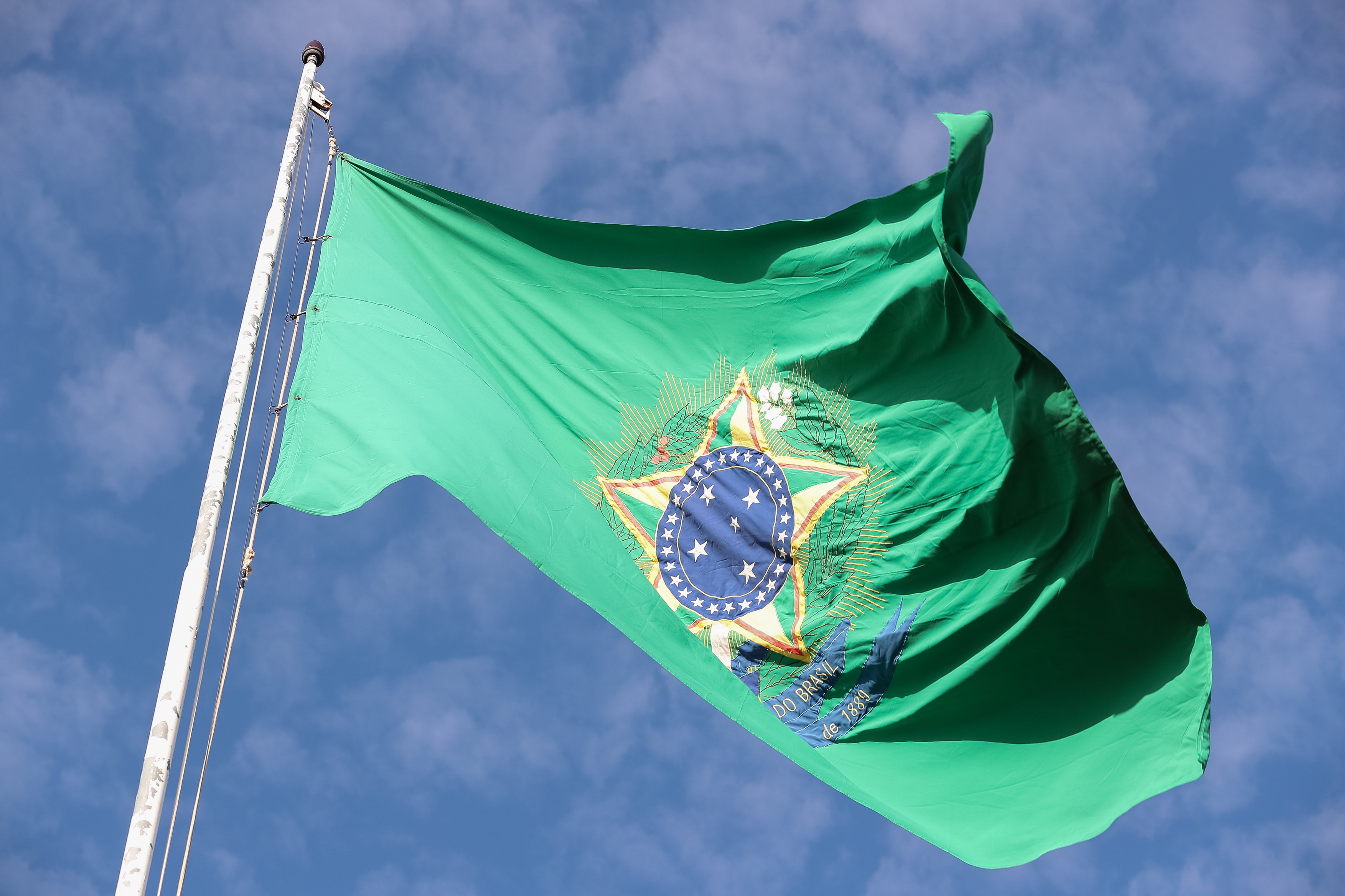 (Brasília - DF, 04/06/2019) Hasteamento da Bandeira Nacional no Palácio do Alvorada.Foto: Marcos Corrêa/PR